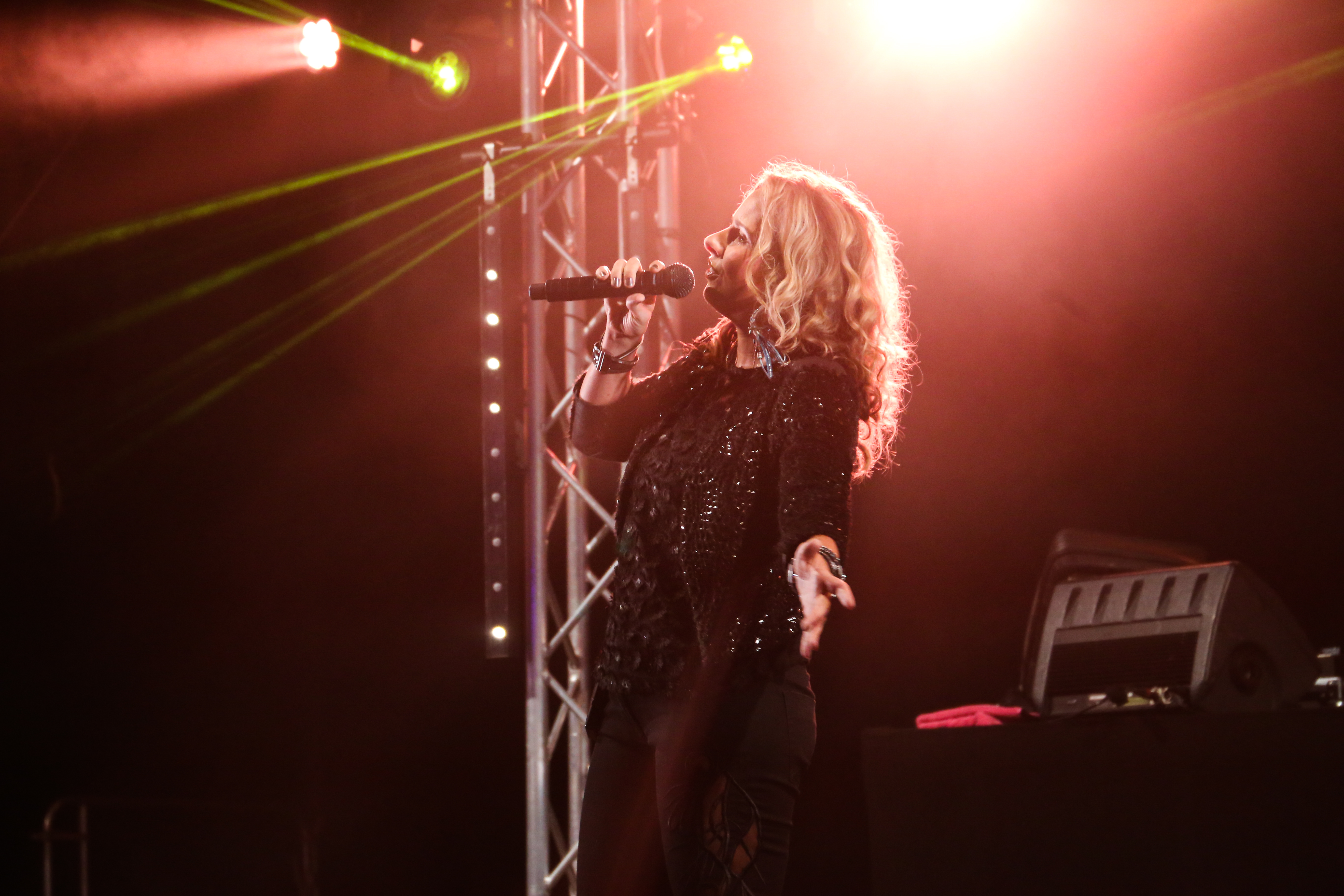 Zangeres Tamara Tol in Emmen in 2017